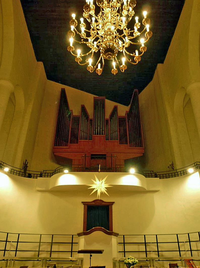 Reformierte Kirche in Leipzig